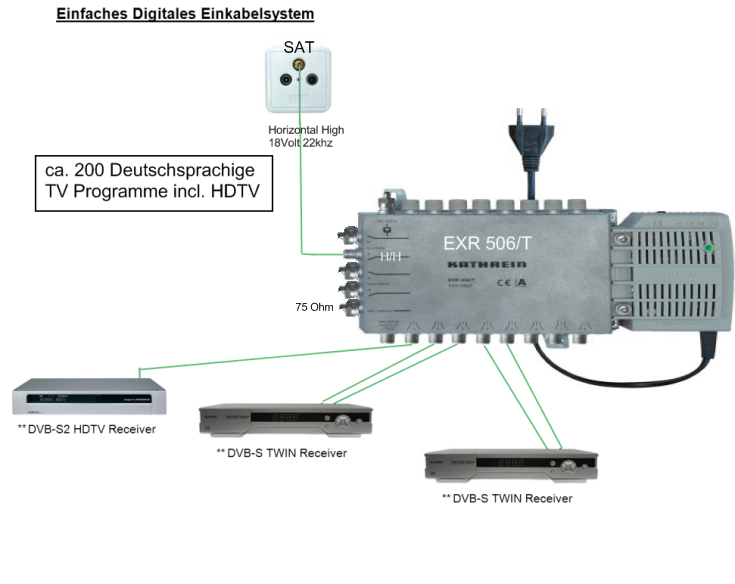 Einkabelsystem zum nachrüsten einer bestehenden Digitaltauglichen Astra Sat Empfangsanlage. An einer Antennendose können mit einer solchen Konfiguration mehrere Digitale Sat Receiver ohne gegenseitige Beeinflussung betrieben werden (Empfang der Horizontalen Astra Ebene 11,7-12,75 Ghz). Diese Empfangsvariante ist mittels H104Plus oder ähnliche Sat ZF Umsetzer weiters für einen ORF HDTV Empfang sowie zum Empfang der ARD Programme Eins Extra, Eins Festival, Eins Plus, arte und Phönix, geeignet. H104Plus Systeme oder ähnliche Umsetzer ermöglichen ein Einbinden von bis zu vier weiteren Transpondern (aus Astra Vertikal oder Türksat Eutelsat usw.) diese werden zentral für ein gesamte Sat Empfangsanlage unmittelbar nach dem LNB platziert.